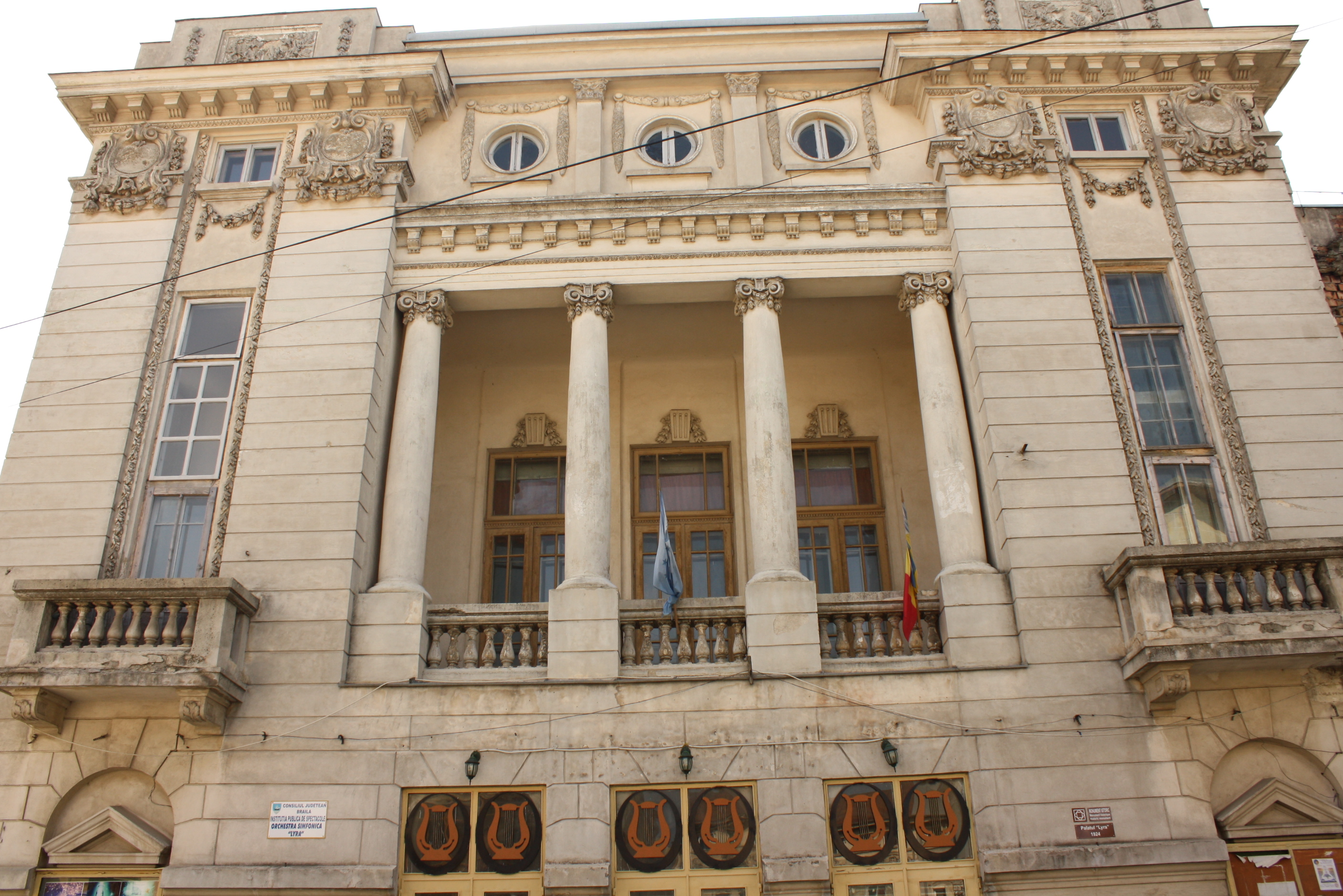 Palatul " Lyra" - Municipiul Braila